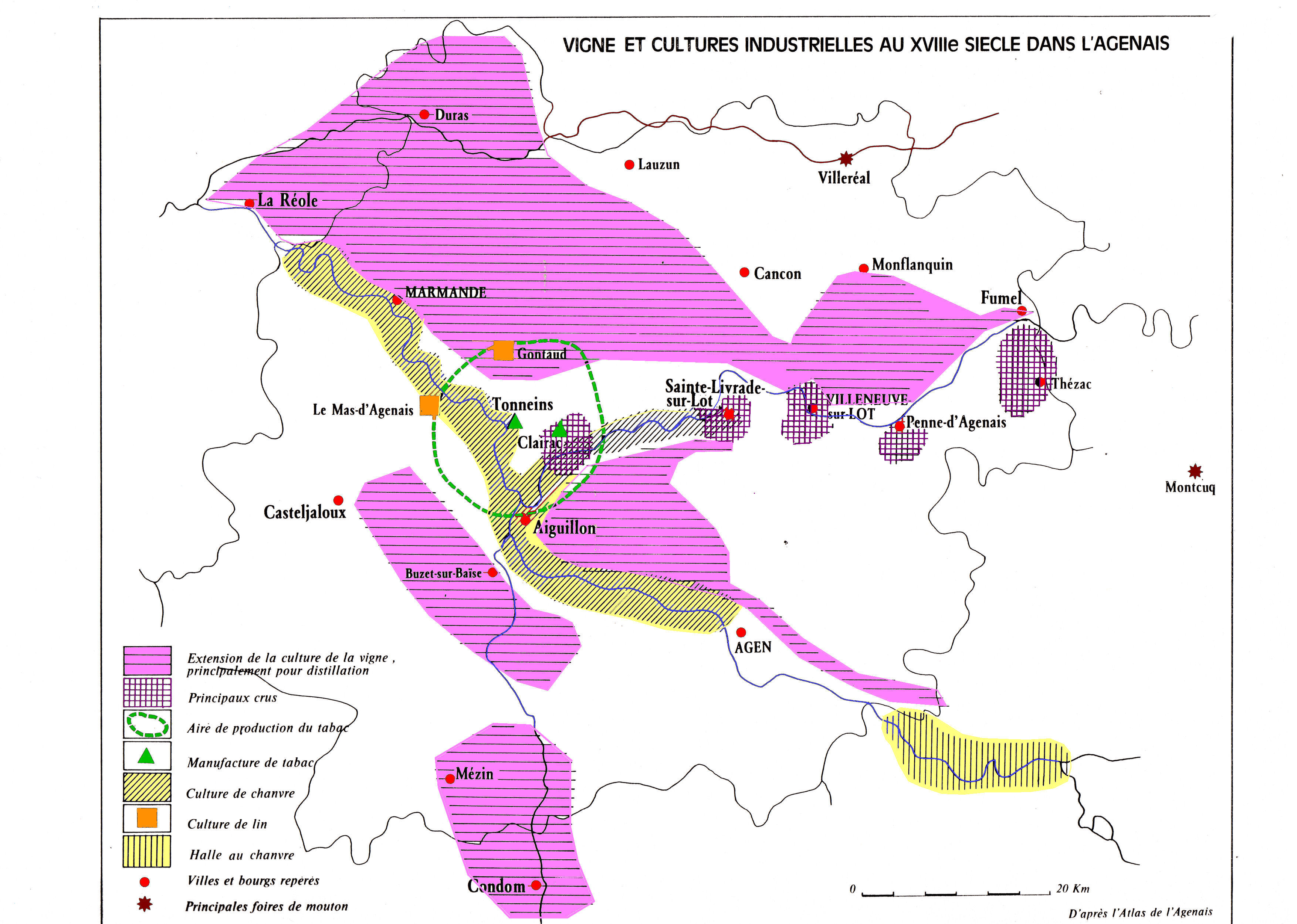 Quelques spécialisations agricoles au 18e siècle en Lot-et-Garonne